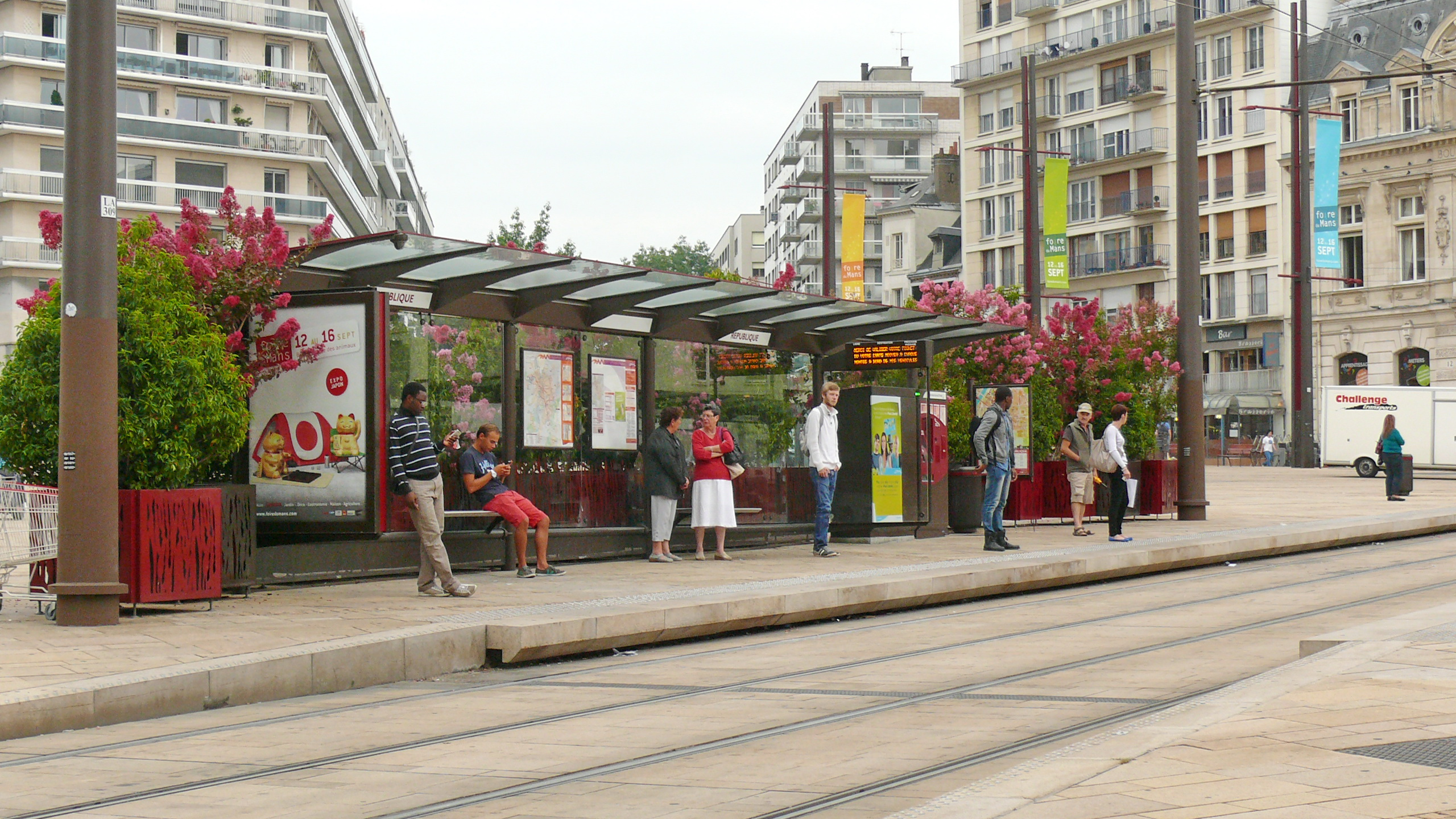 Aménagement de la station de tramway de la Place de la République au Mans